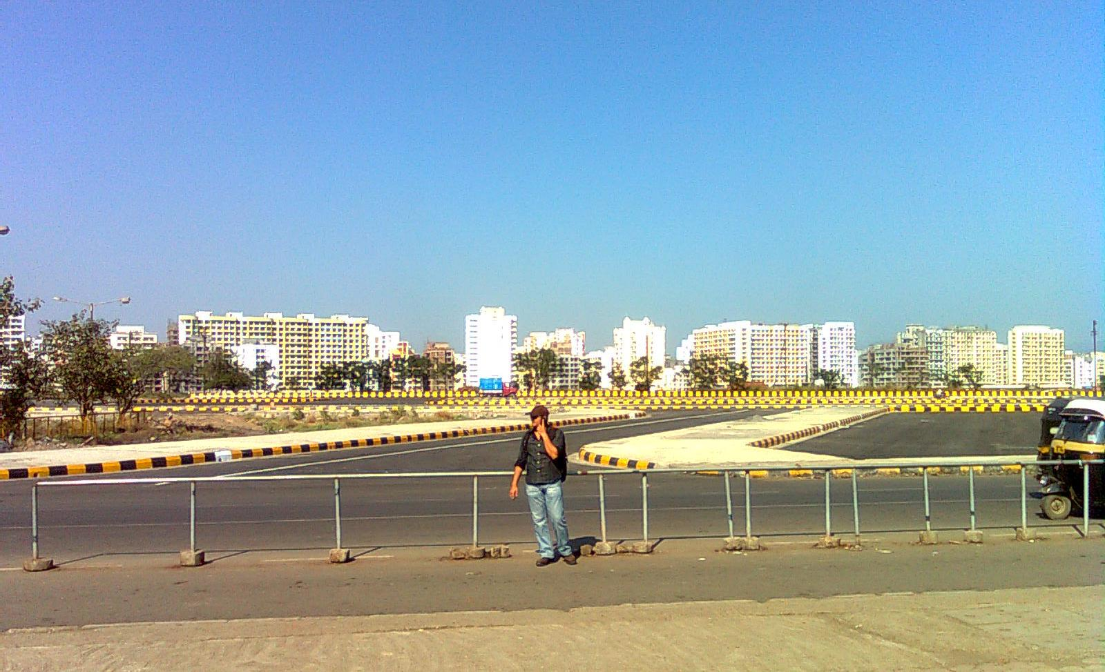 खानदेश्वर रेल्वे स्टेशन